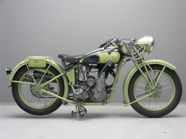 Ardie RBK 505 Bergfreund motorcycle from 1936